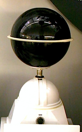 Spitz Junior planetarium